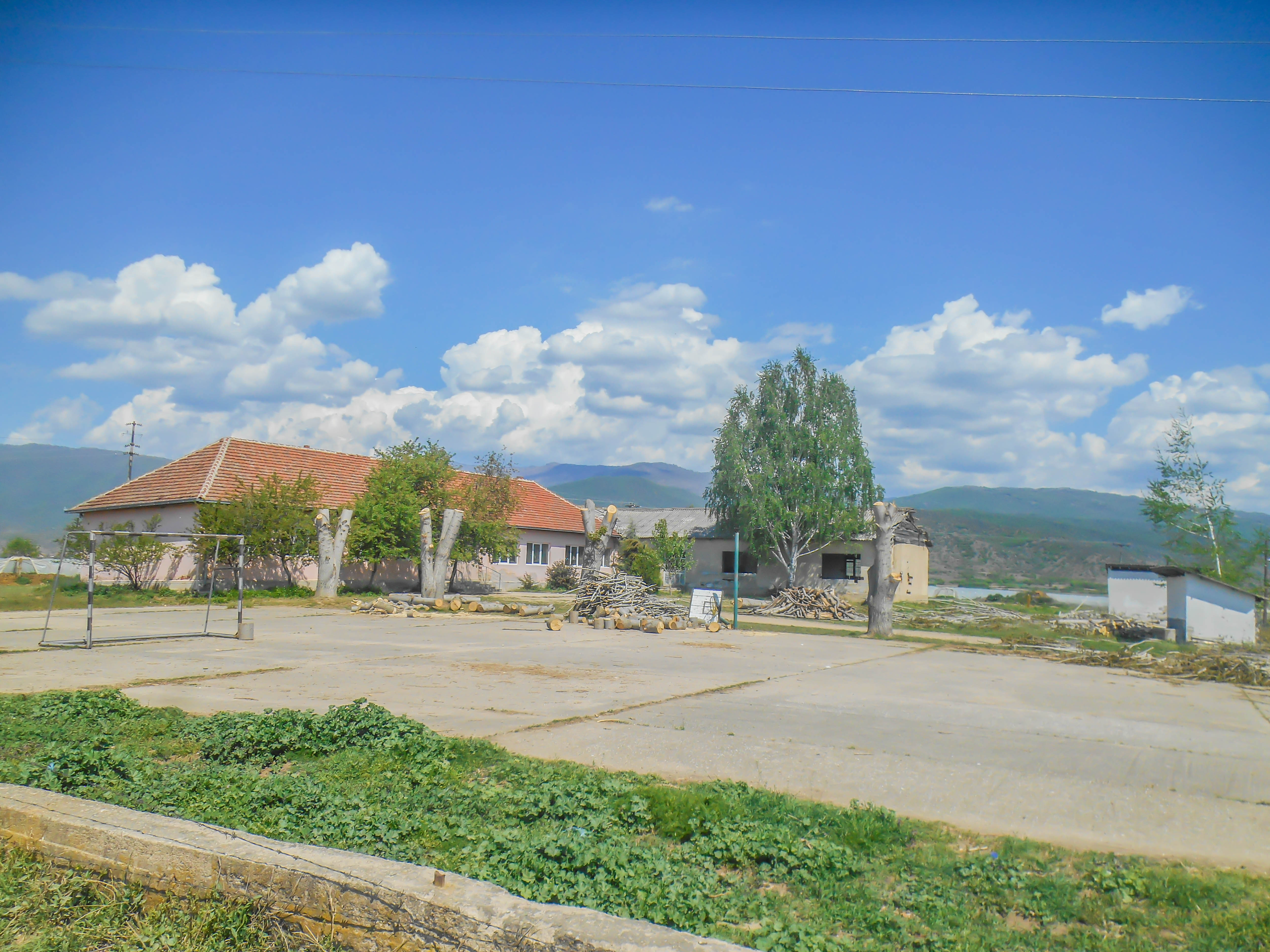 Основно училиште „Св. Кирил и Методиј“ - Секирник